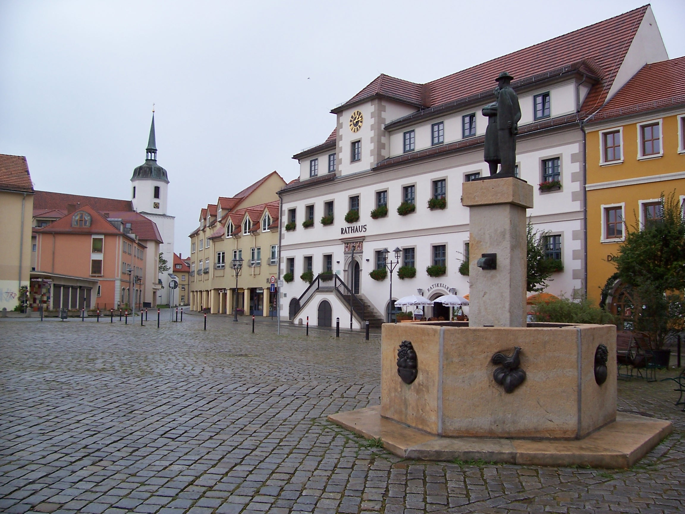 Marktplatz in Hoyerswerda mit Rathaus und „Sorbenbrunnen“ von Jürgen von Woyski, im Hintergrund ragt die Johanneskirche empor.